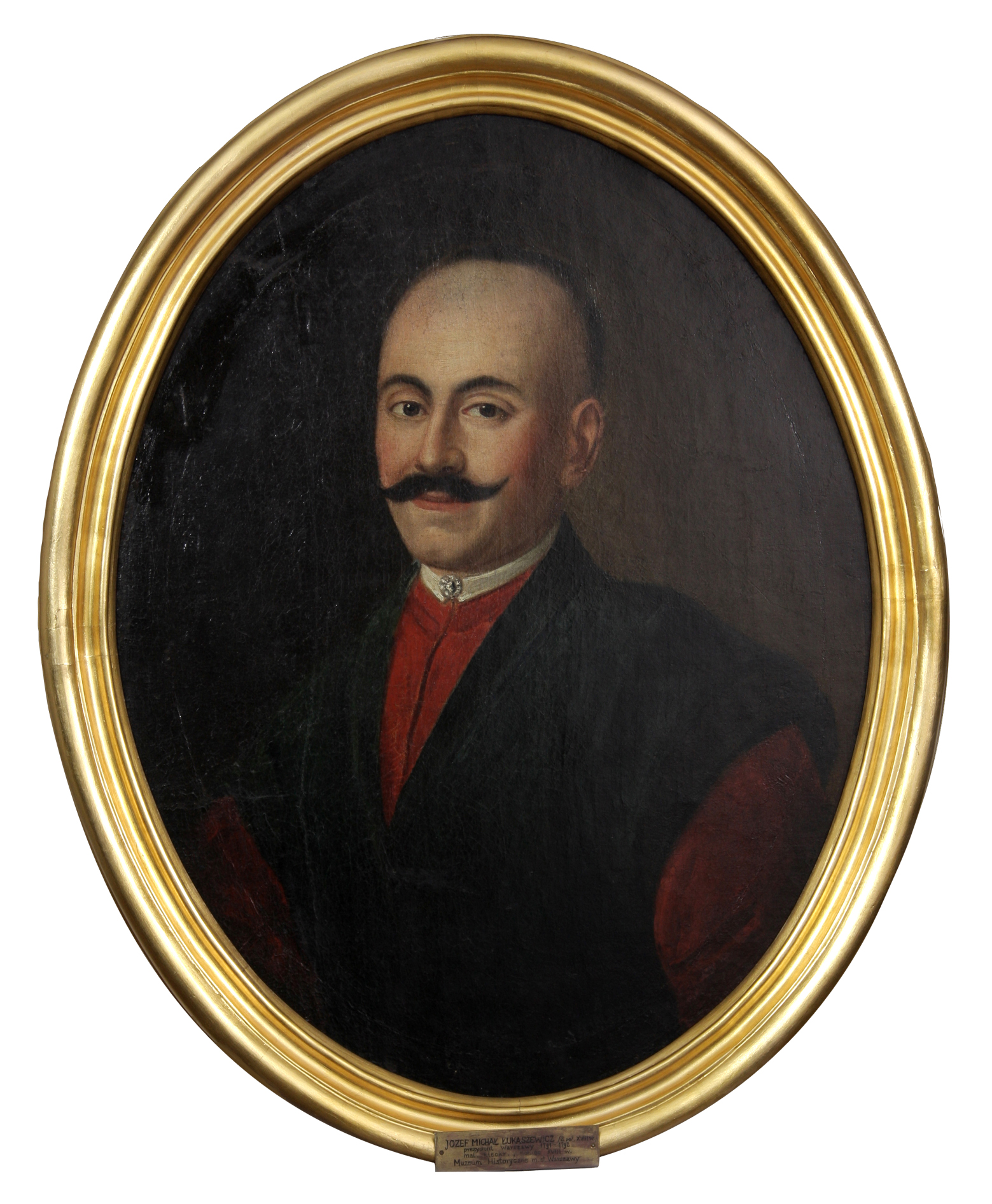 Президент Варшавы Юзеф Михал Лукасевич